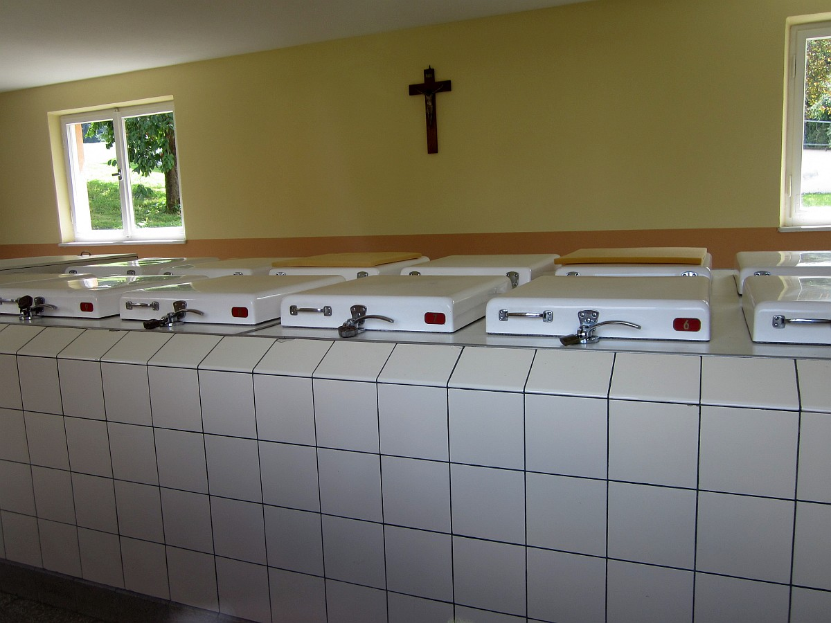 Blick auf die Truhen der 1958 errichteten Gemeinschafts-Gefrieranlage in Steinfeld (Stadelhofen)